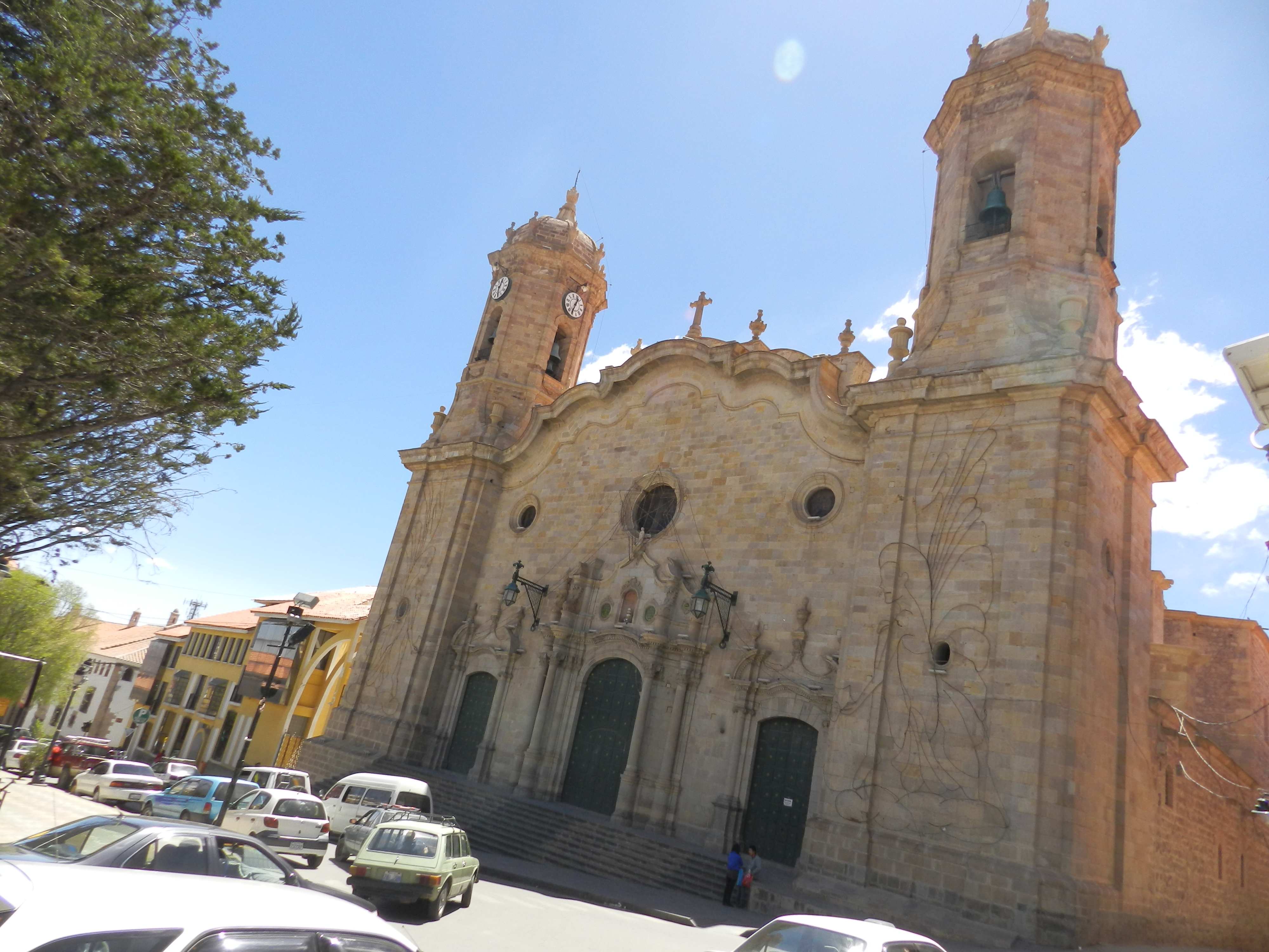 Catedral This medium shows the protected monument with the number P/00-017 in Bolivia.